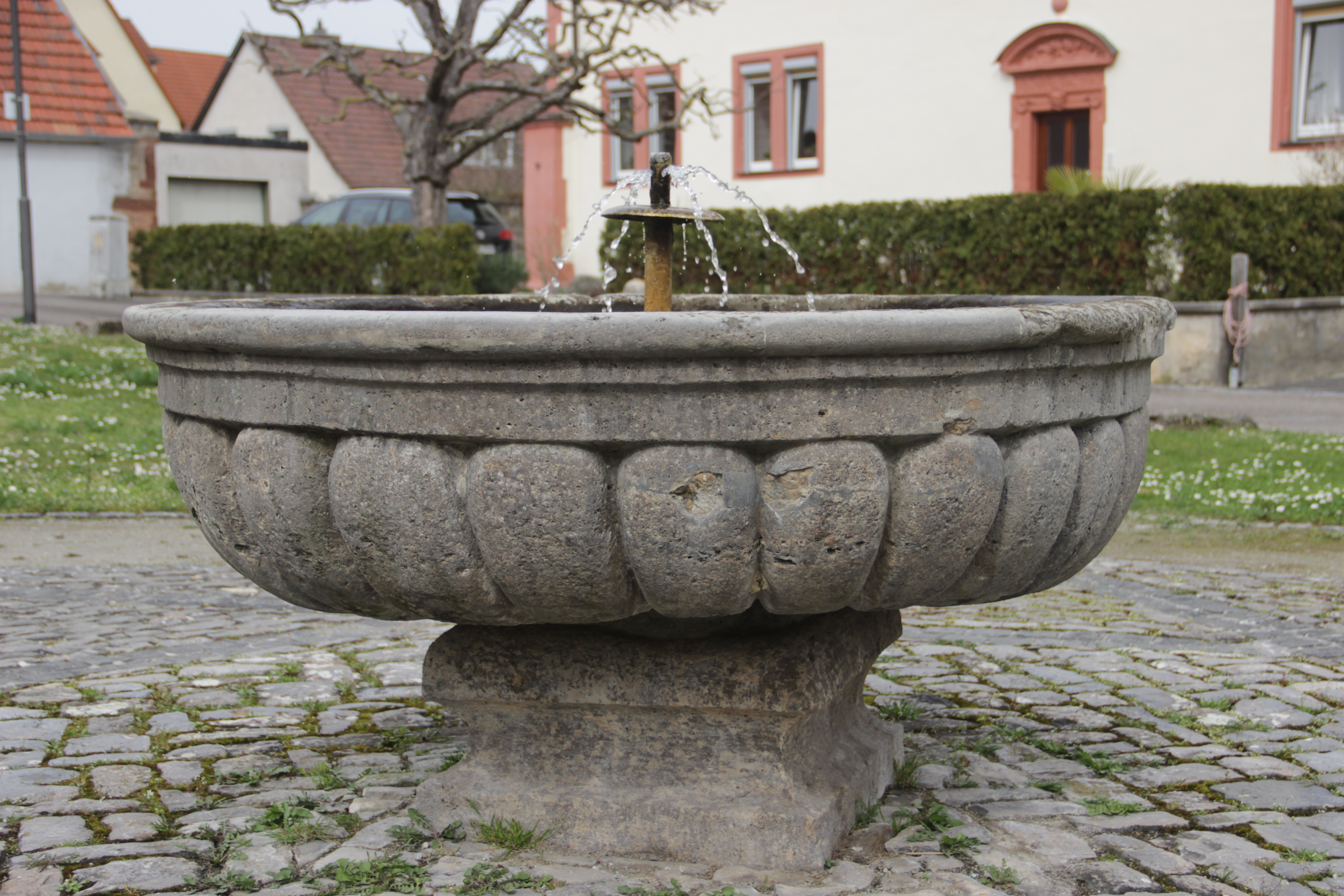 Brunnenschale des ehemals Prämonstratenserinnenklosters Unterzell, muschelförmige Brunnenschale auf Postament, Muschelkalk, 17.Jahrhundert